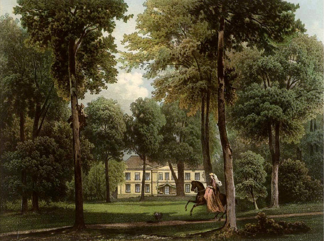 Rittergut Elvershagen, Kreis Regenwalde, Provinz Pommern, Lithografie aus dem 19. Jahrhundert